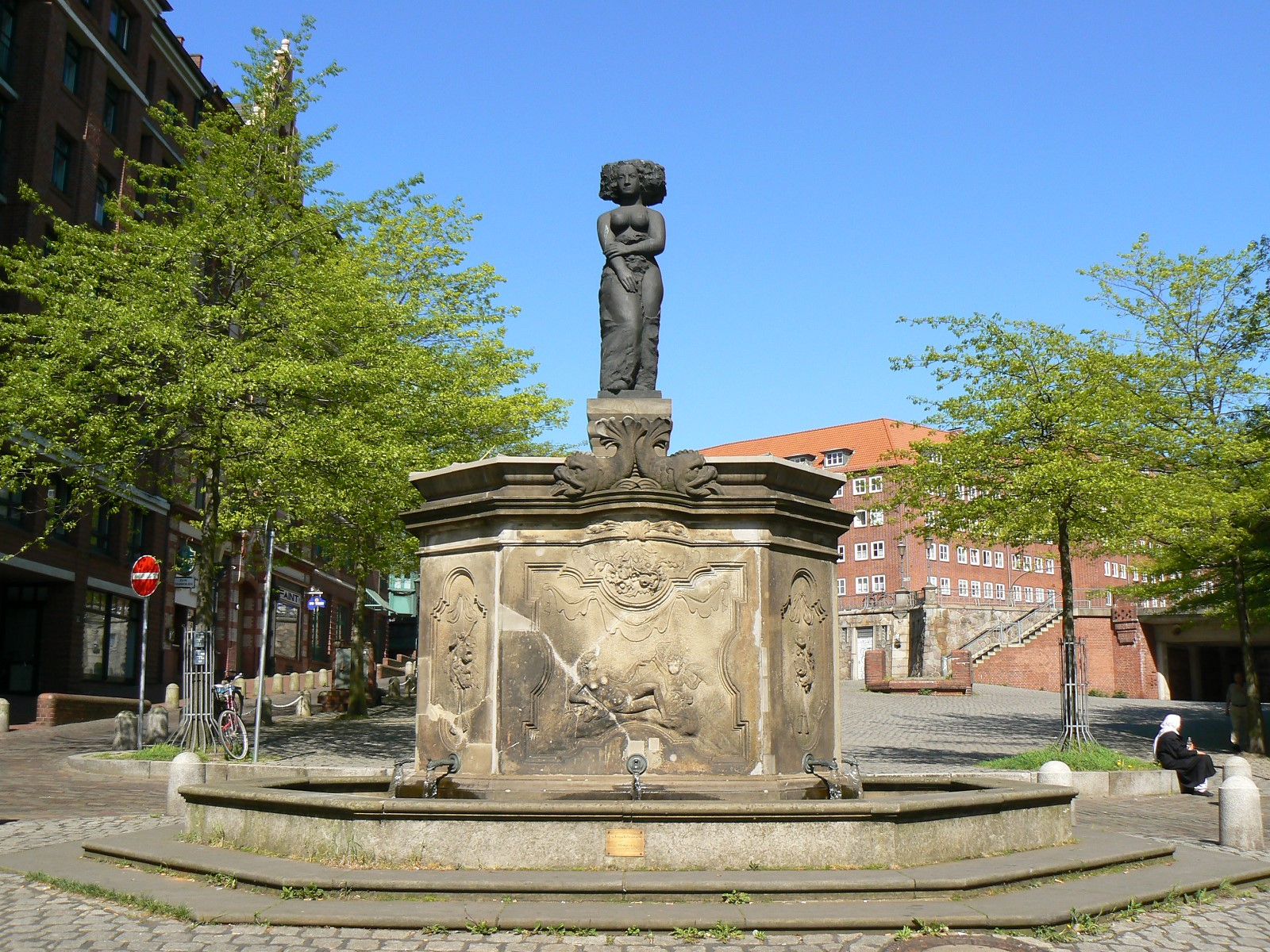 Fischmarktbrunnen von 1742, Minerva Statue erneuert von Hans Kock 1989. Standort: Altonaer Fischmarkt in Hamburg.